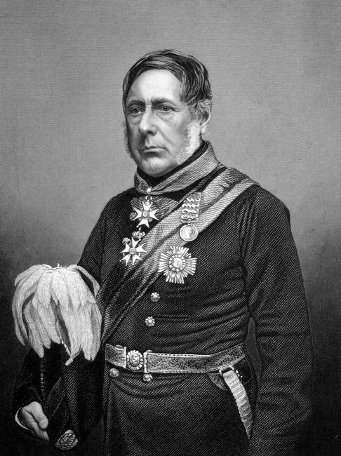 Lord William Henry Cavendish-Bentinck (b.1774-d.1839), britischer General und Staatsmann